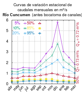 Caudales medios mensuales del rio Cuncumén en Cuncumén. # cita publicación # | apellido = Dirección General de Aguas # | nombre = # | enlace-autor = Ministerio de Obras Públicas (Chile) # | título = Diagnóstico y clasificación de los cursos y cuerpos de agua según objetivos de calidad. Cuenca del río Choapa # | ubicación = Santiago de Chile # | editorial = Ministerio de Obras Públicas (Chile) # | año = 2004 # | edición = # | url = # | ref = harv # p.45 mes 5% 10% 20% 50% 85% 95% abr 1.430 1.173 0.918 0.558 0.277 0.167 may 1.386 1.144 0.901 0.553 0.274 0.163 jun 1.543 1.314 1.076 0.716 0.396 0.251 jul 1.488 1.287 1.068 0.720 0.407 0.277 ago 1.498 1.283 1.059 0.721 0.421 0.284 sep 2.137 1.715 1.314 0.790 0.422 0.292 oct 2.838 2.200 1.616 0.896 0.433 0.283 nov 3.480 2.651 1.904 1.007 0.452 0.278 dic 5.797 3.779 2.263 0.877 0.311 0.192 ene 3.038 2.234 1.539 0.755 0.314 0.187 feb 2.492 1.858 1.302 0.660 0.286 0.175 mar 1.820 1.406 1.028 0.566 0.271 0.176